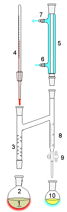 Deank stark apparatus.png